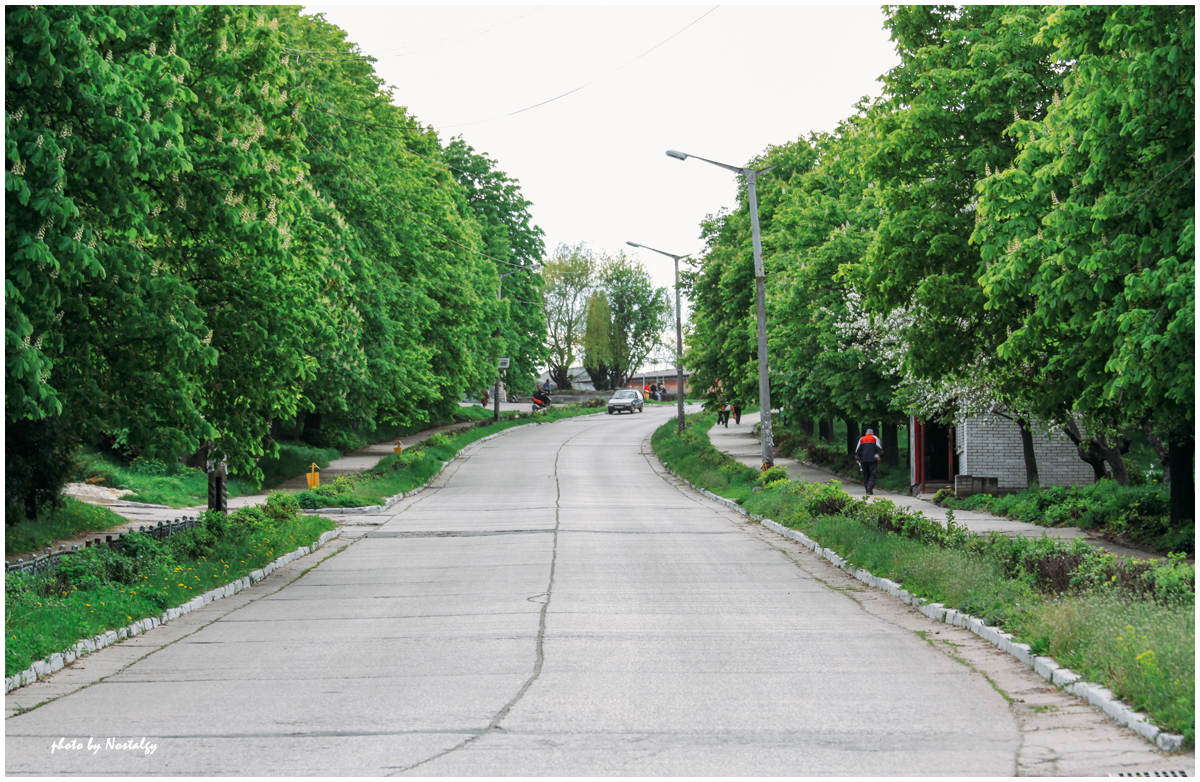 Центральна вулиця, смт Ладин